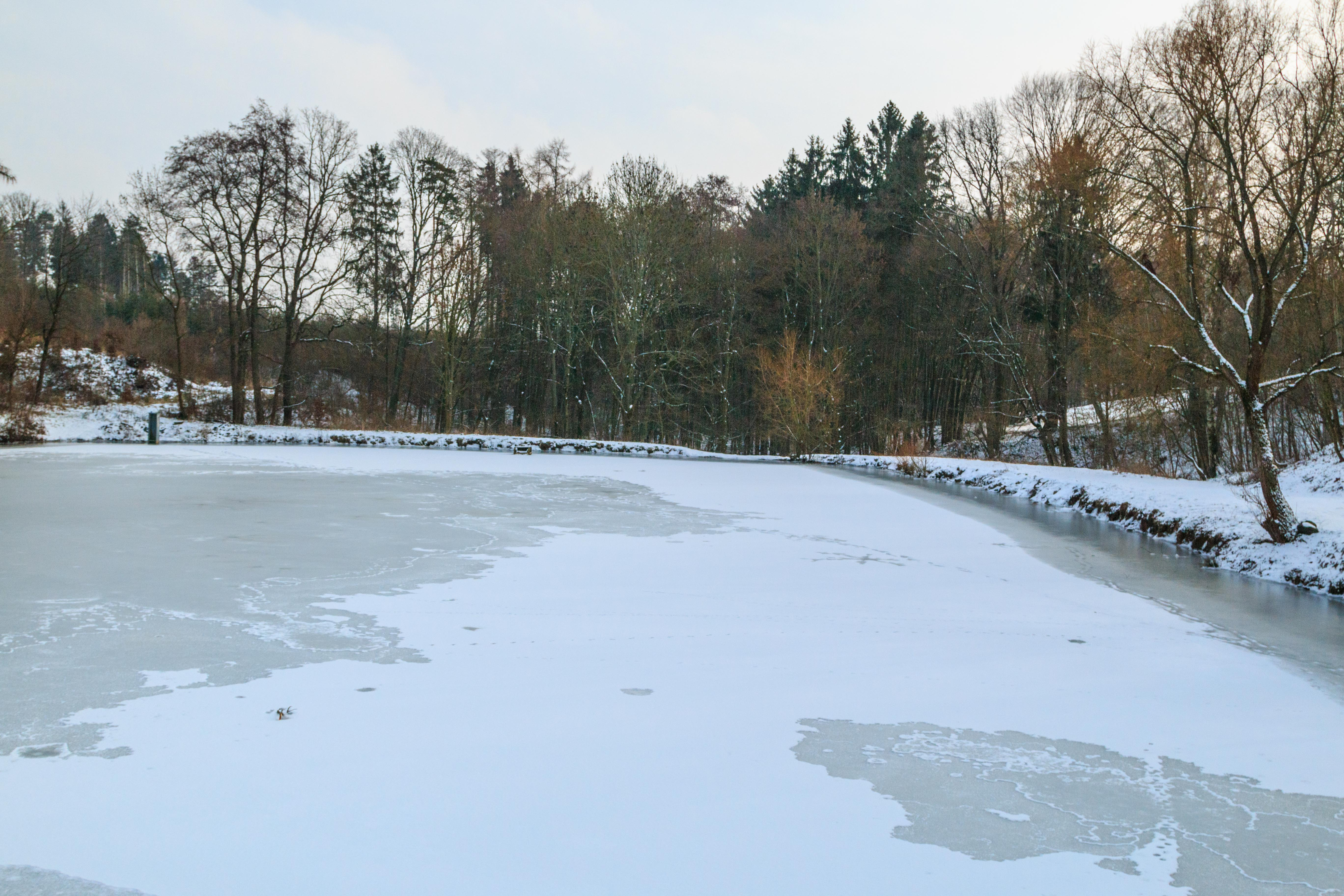 Podleštinský rybník